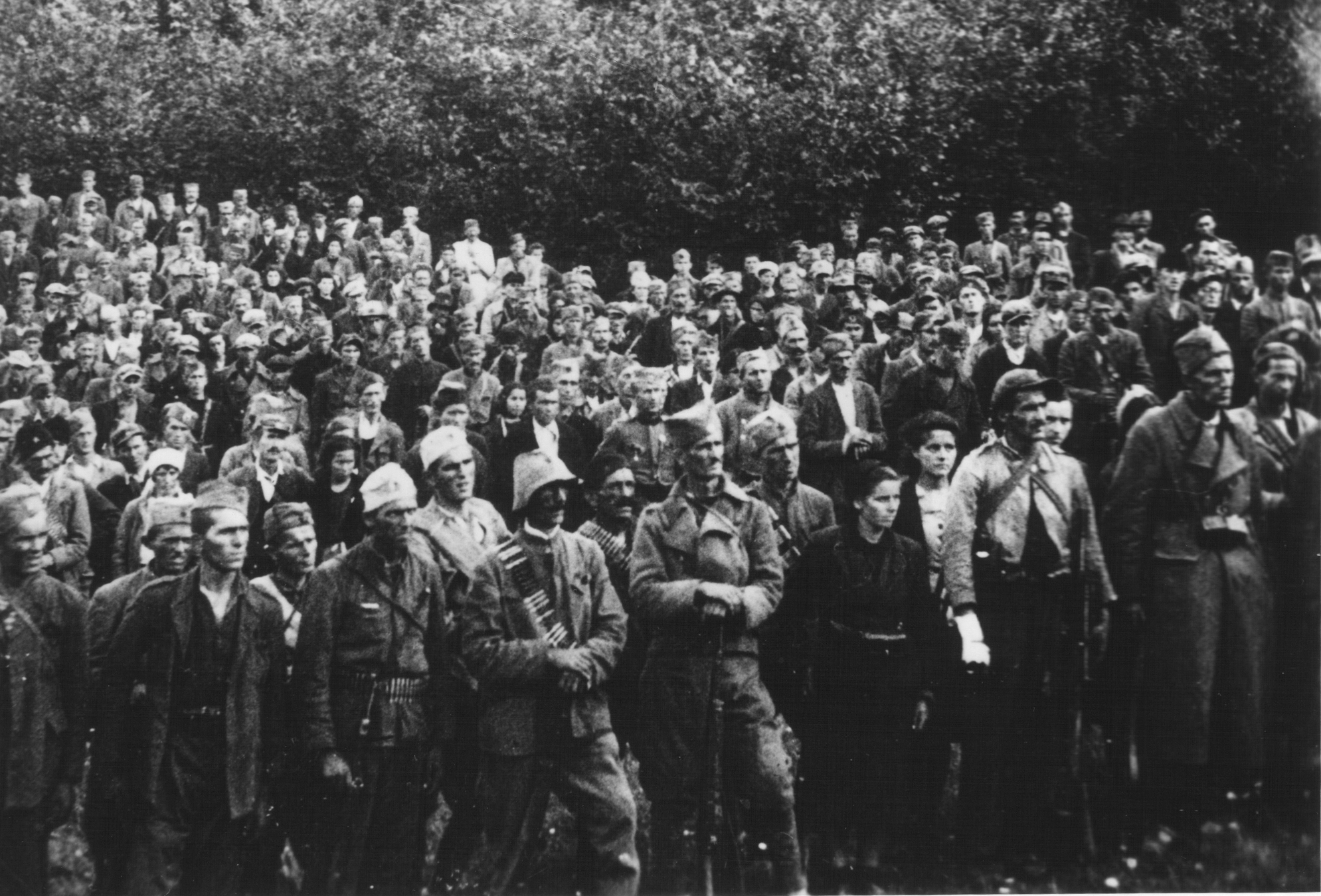 Srpskohrvatski / српскохрватски: Borci 4. crnogorske brigade za vreme smotre, Zelengora, jun 1942.